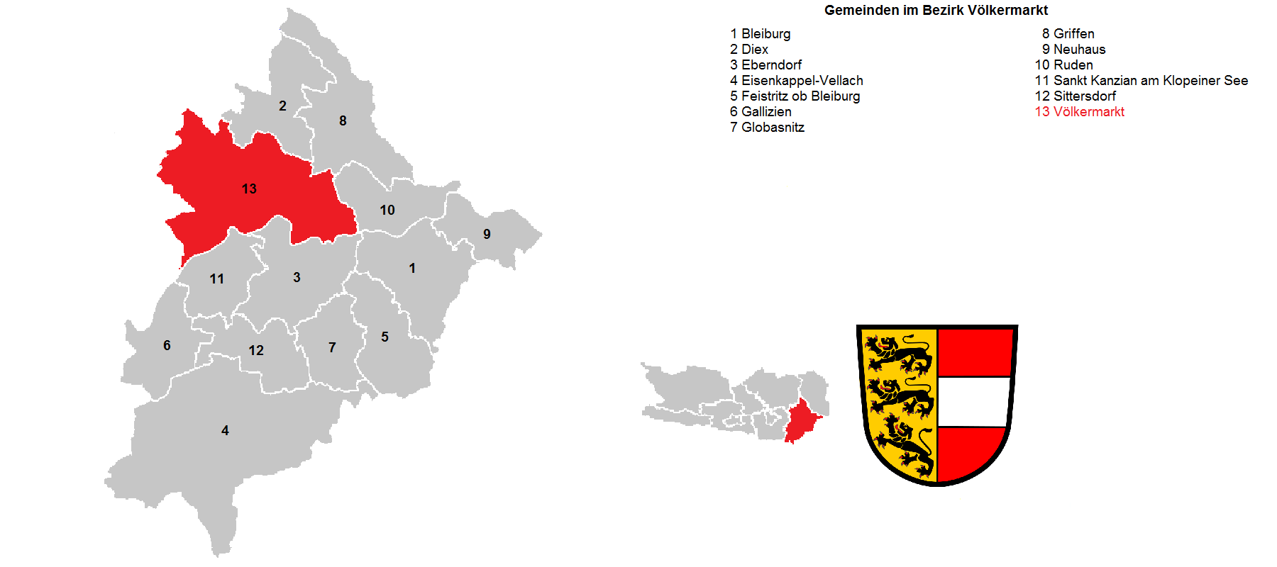 Bezirk Völkermarkt